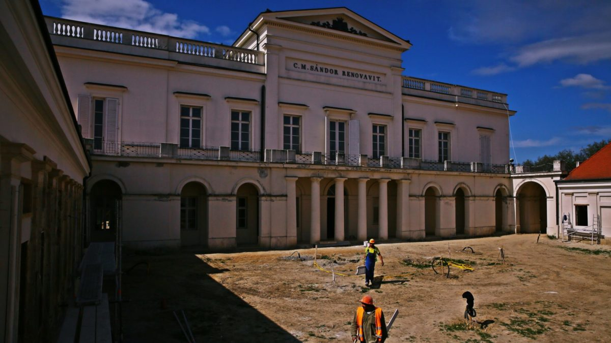 A bajnai Sándor–Metternich-kastély felújítása a Nemzeti Kastélyprogram és Nemzeti Várprogram keretében.